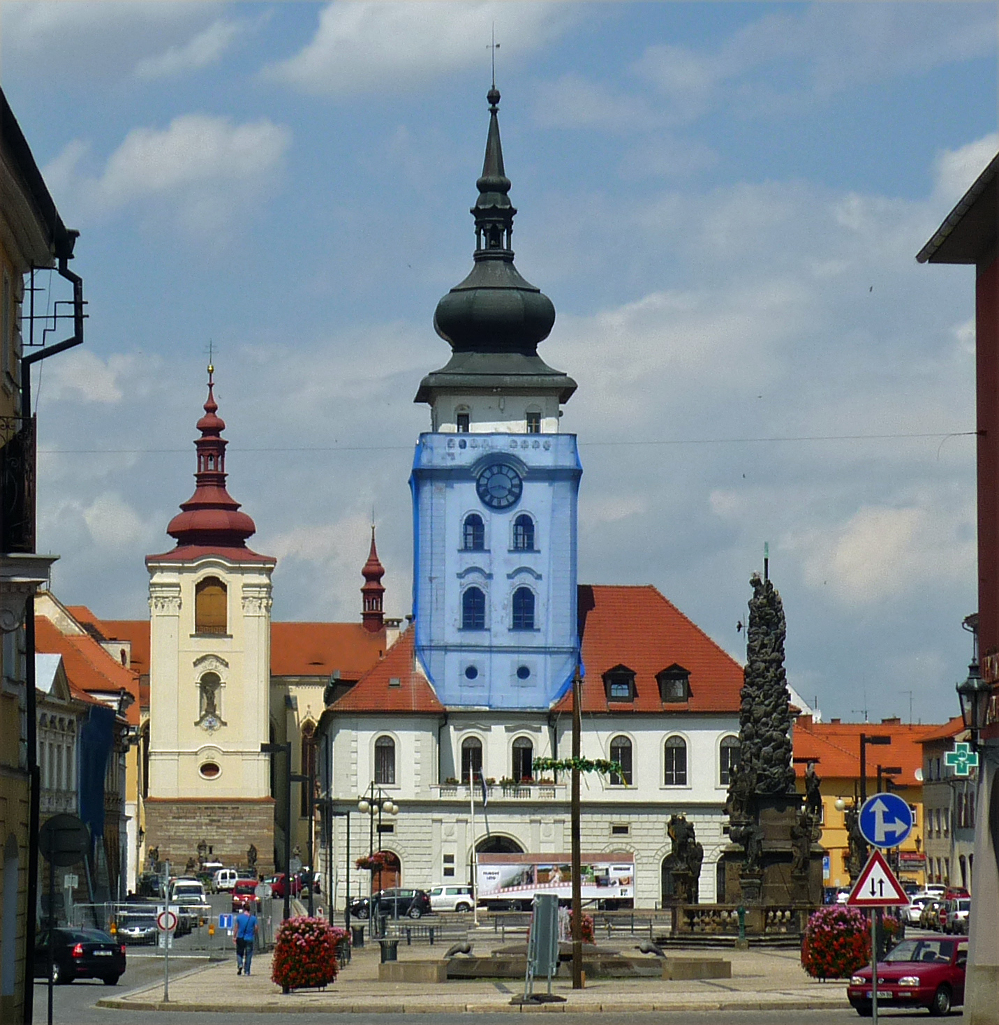 Saaz (Žatec): Renovierung am Rathaus